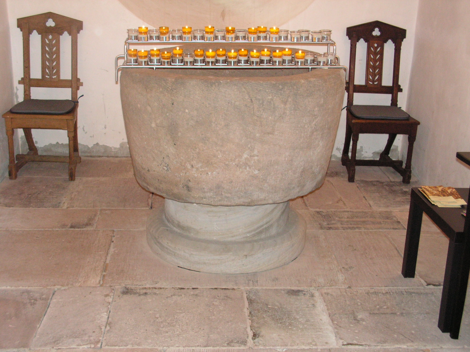 Taufbecken (Kump) in der ehemaligen Klosterkirche Caldern